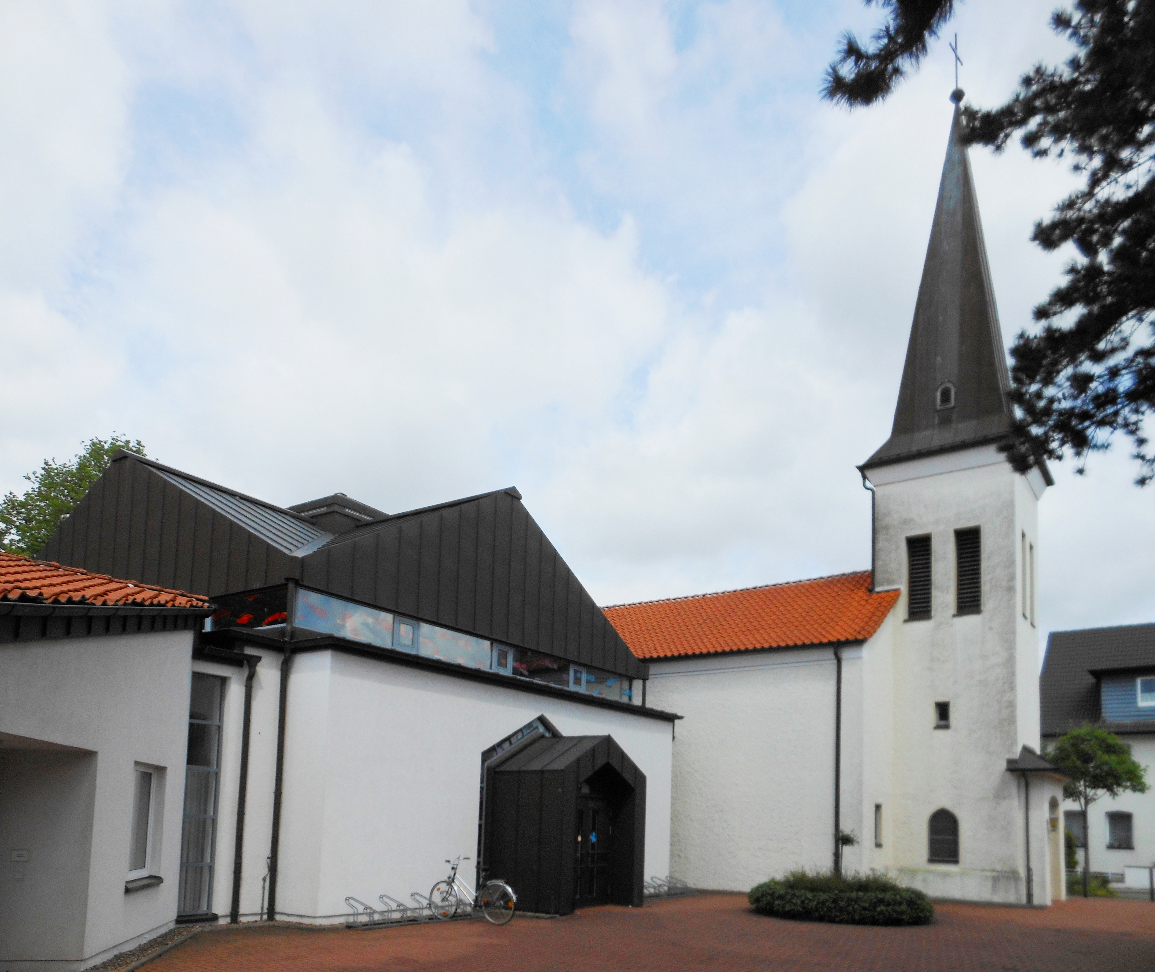 Bad Nenndorf, kath. Kirche Maria vom hl. Rosenkranz